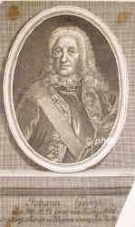 Porträt des Reichsvizekanzlers Johann Georg von Königsfeld (Kupferstich 142 x 85 mm)